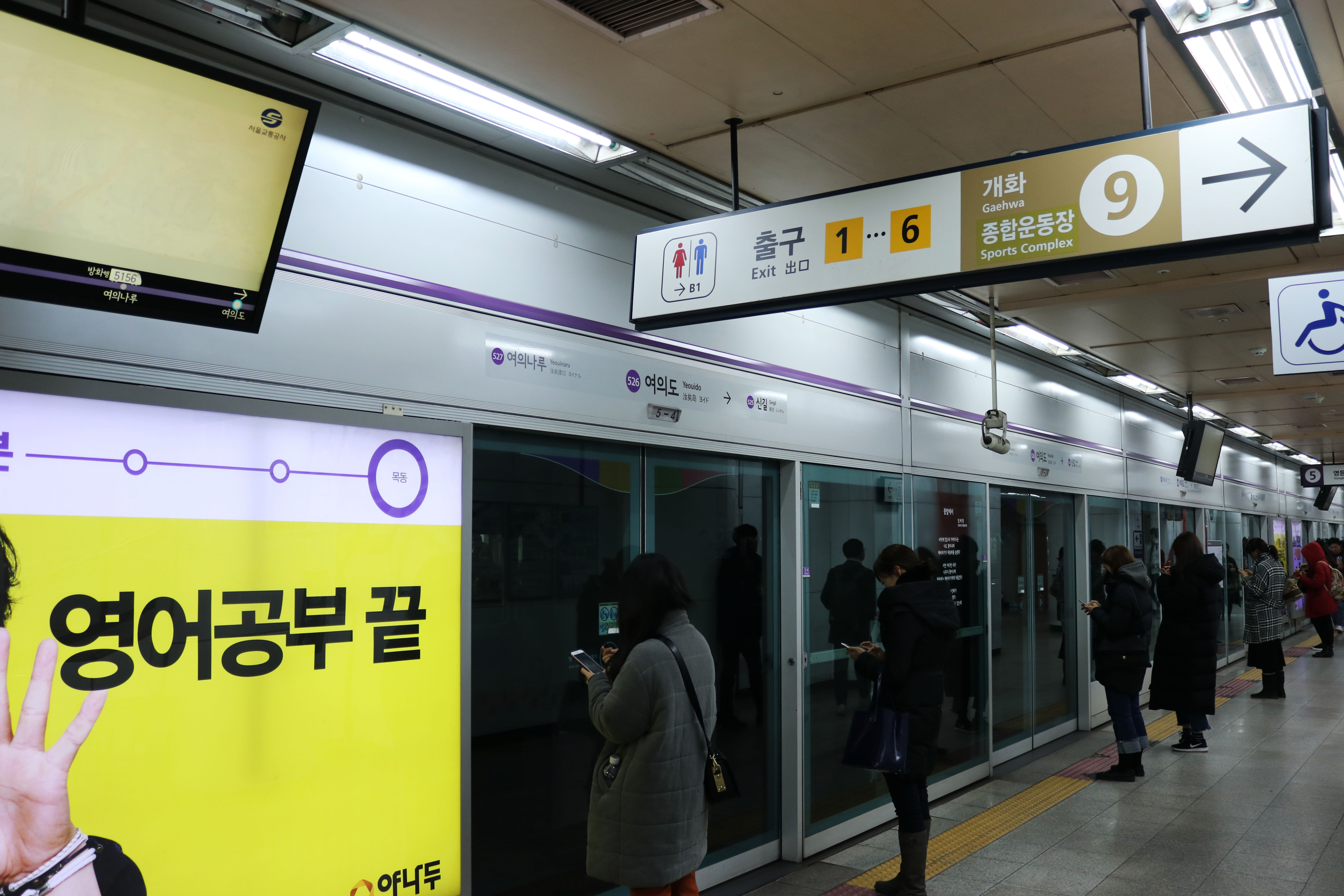 5호선 여의도역 승강장